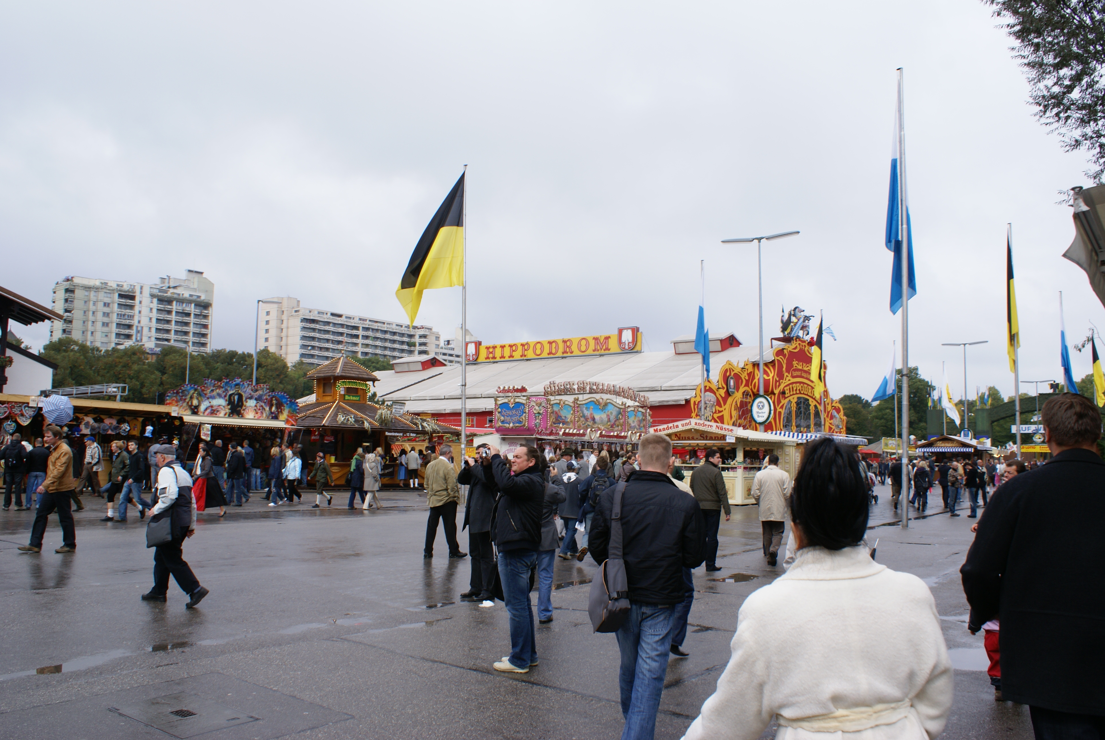 Октоберфест, 2008, Хипподром снаружи